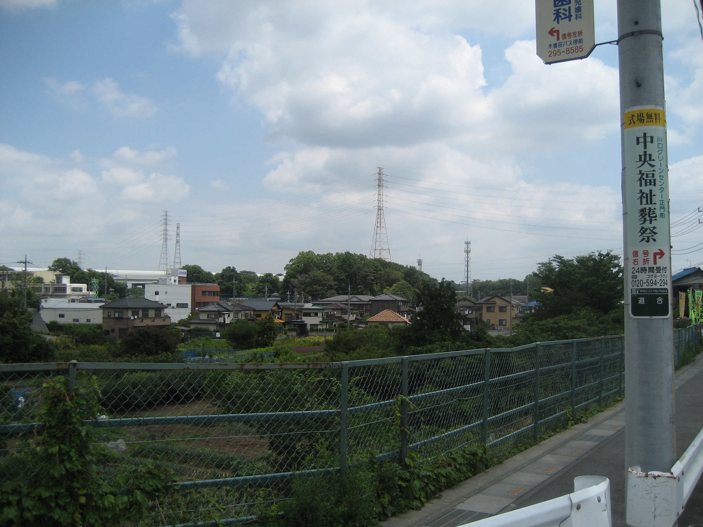 埼玉県川口市道合（神根小学校付近）